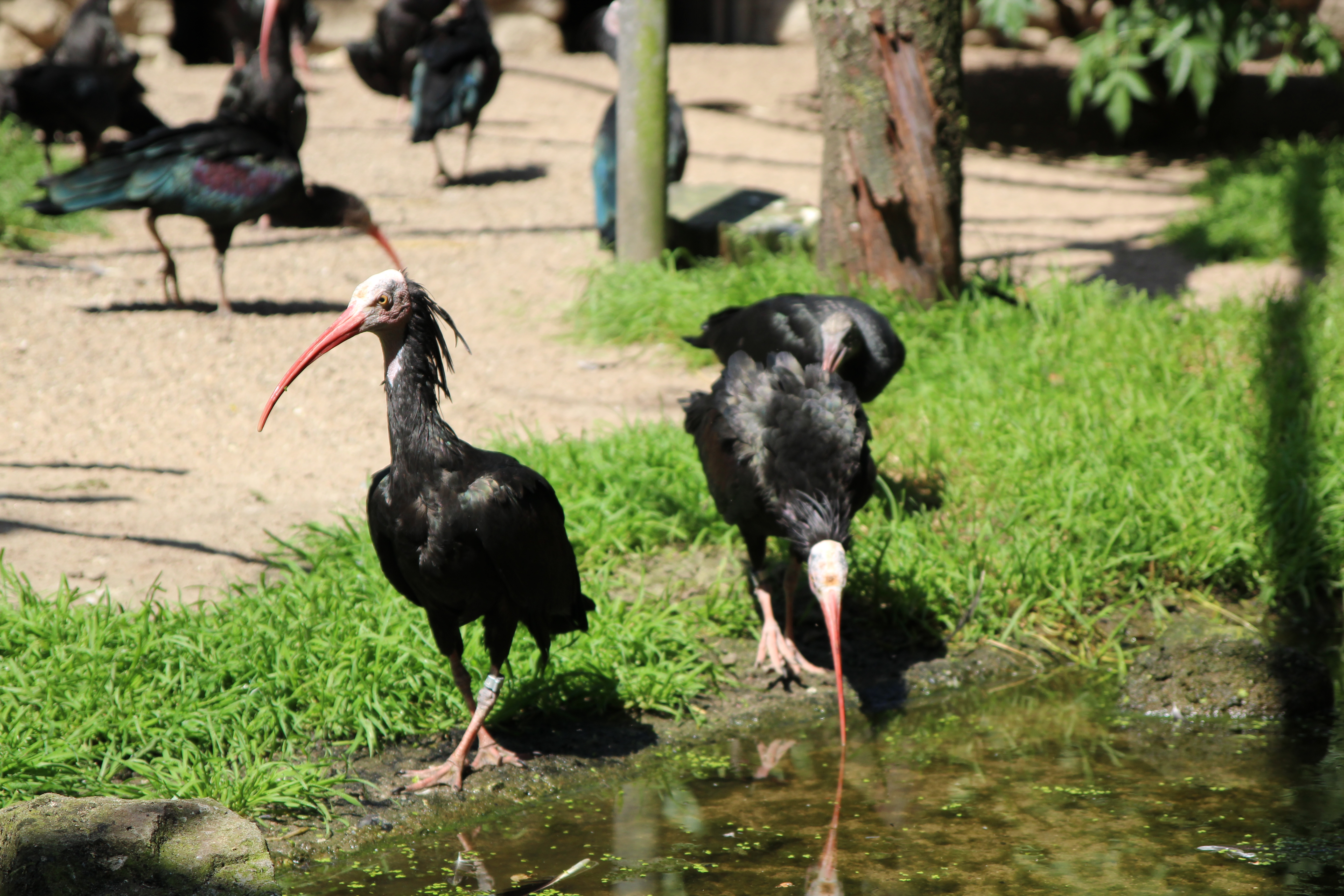 Waldrappe (Geronticus eremita) im NaturZoo Rheine